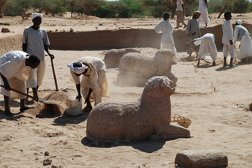 Soudan à El-Hassa dans le temple du Roi AmanaKhereqerem découverte de cinqBéliers de Grés